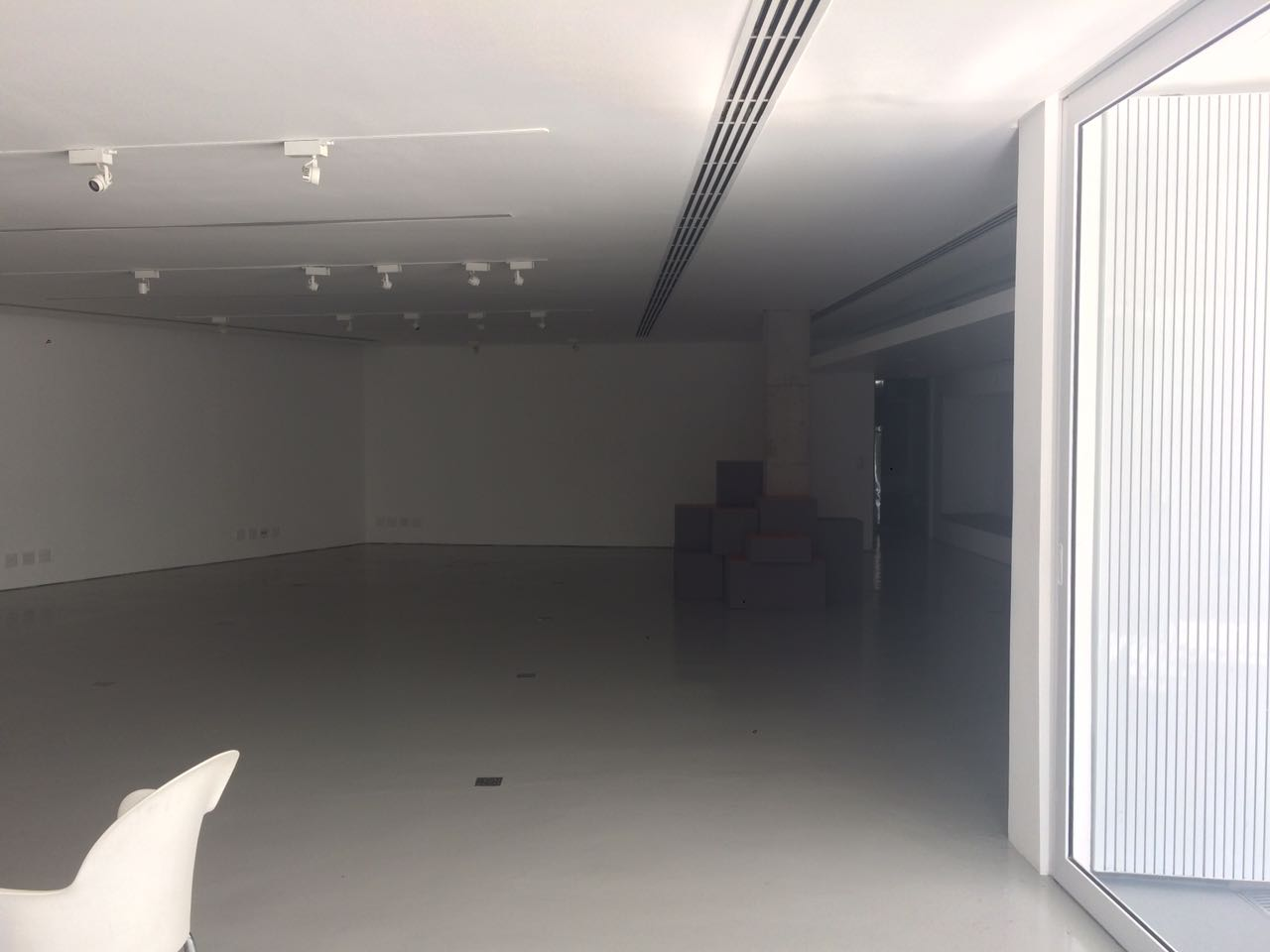 Sala de evento do museu.